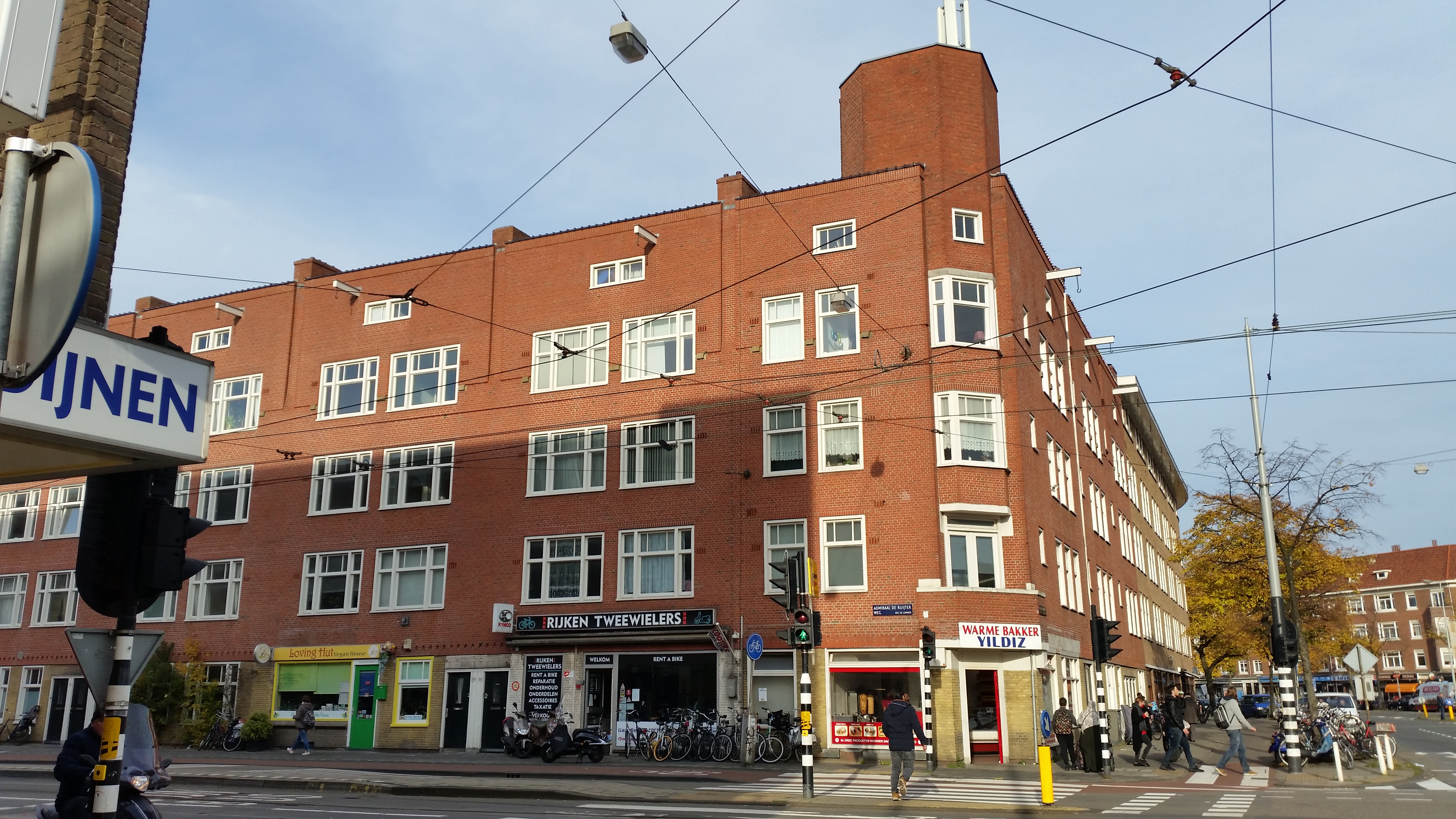 Admiraal de Ruijterweg 330 en hoger op kruising met Bos en Mollerweg, Amsterdam